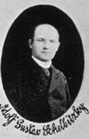 Duchovní farnosti Dolní Poustevna